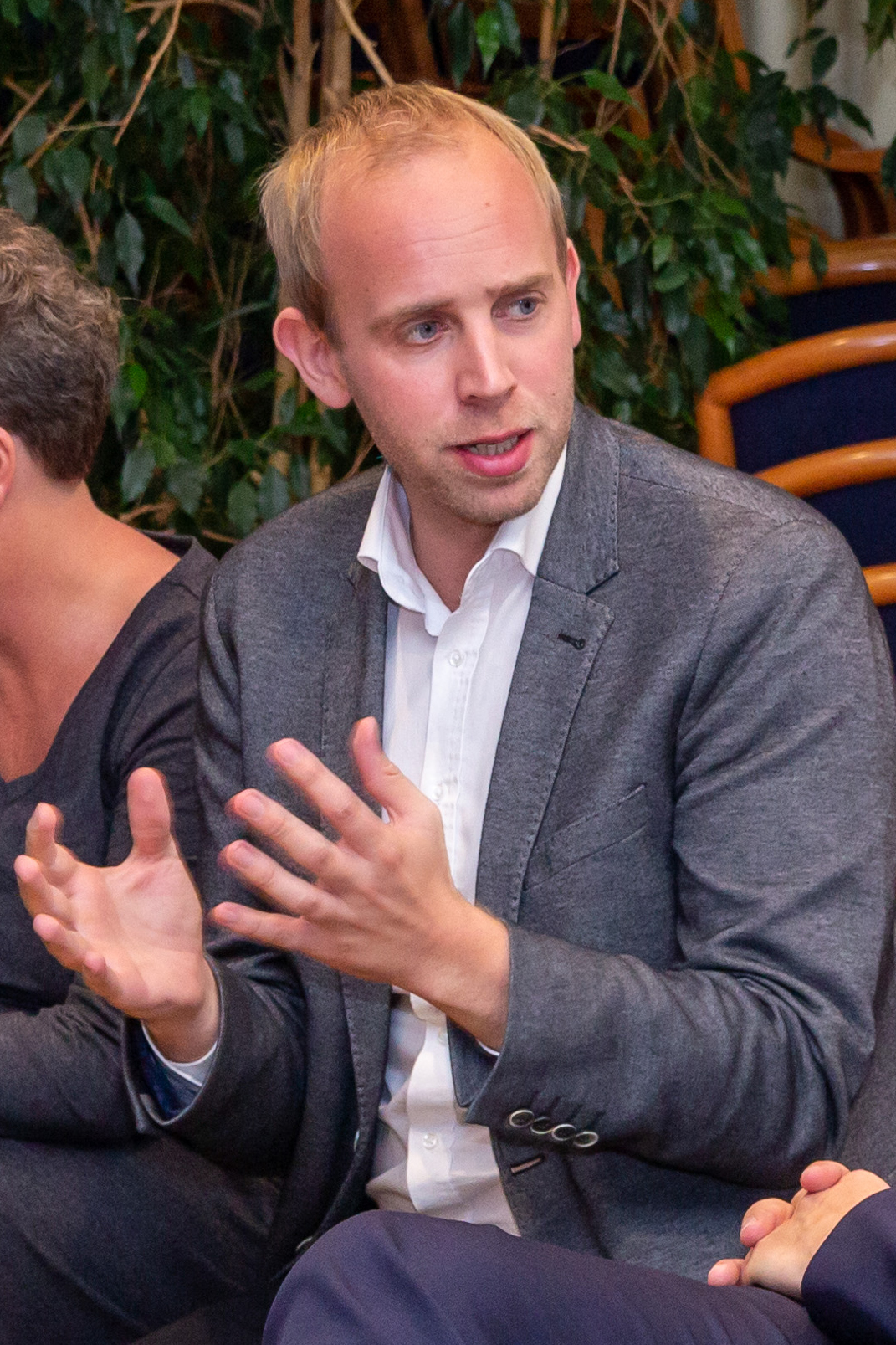 Dennis Rohde bei einer Podiumsdiskussion in Oldenburg, September 2019